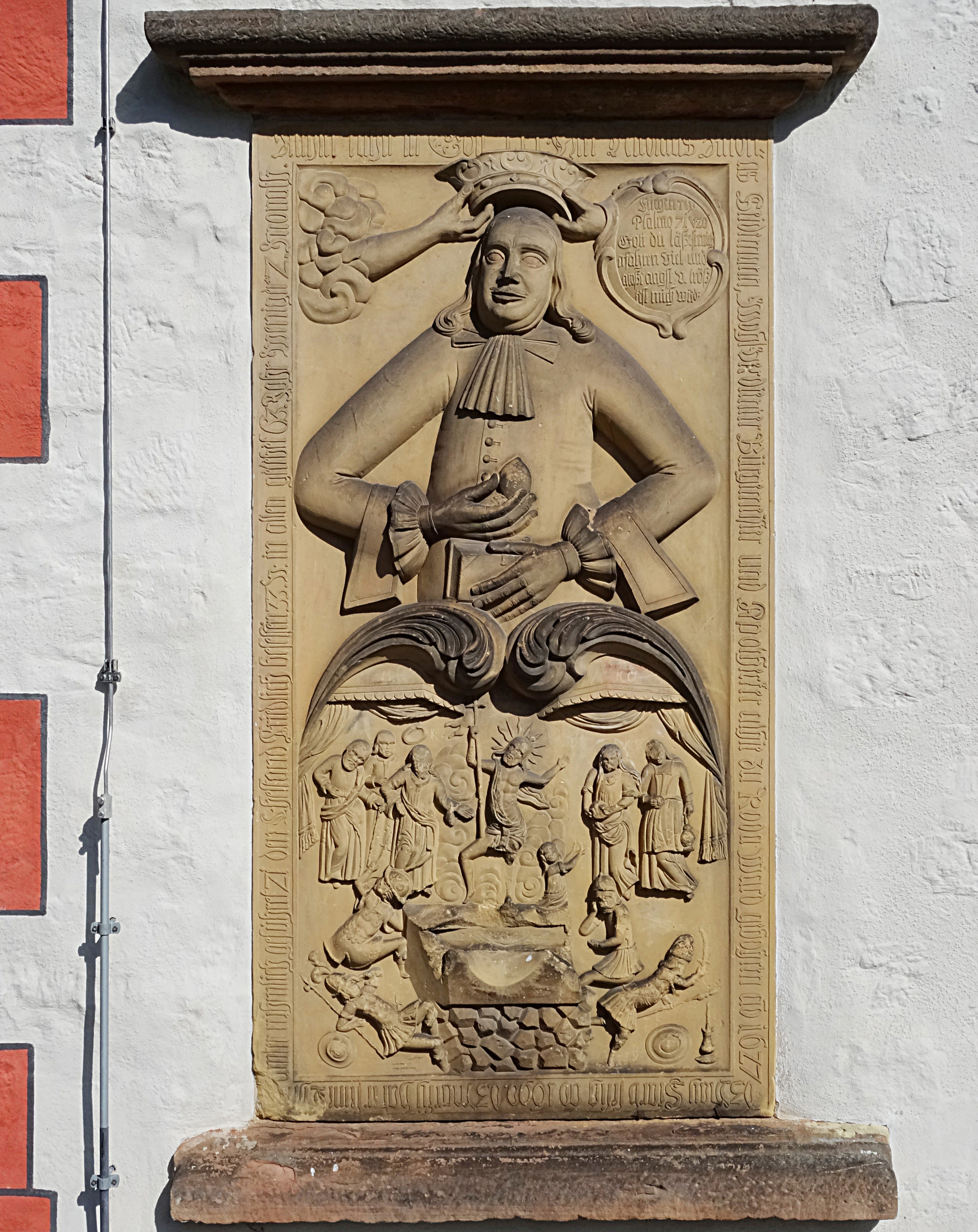 Grabplatte für Nicolaus Andreas Seidemann (1690, einst Bürgermeister und Apotheker in Roda) an der Heilig-Kreuz-Kirche Stadtroda